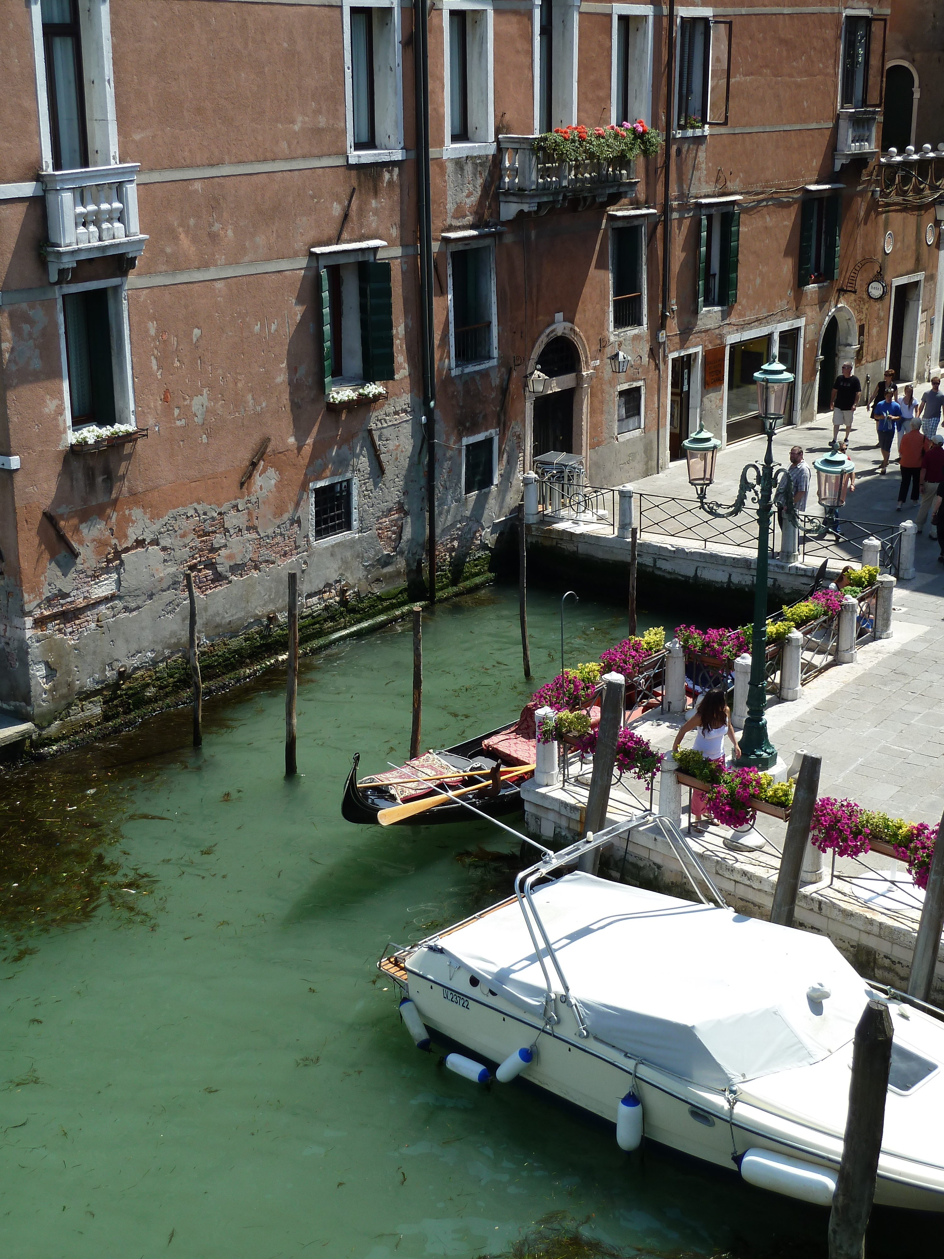 Rio Antonio Foscarini (Venice)